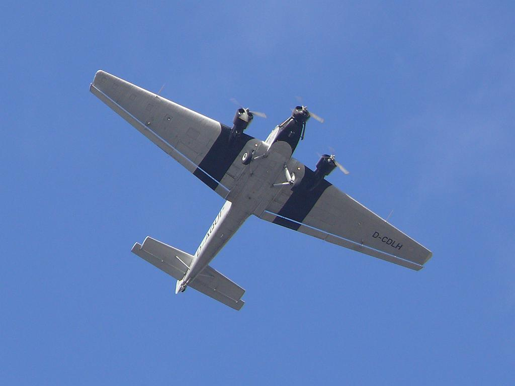 JU 52